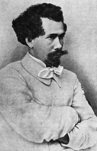 Barbu Ştefănescu Delavrancea (1858-1918), Romanian writer and poet